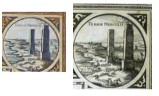 Torres de Hercules em Cadiz (N. J. Visscher 1660)